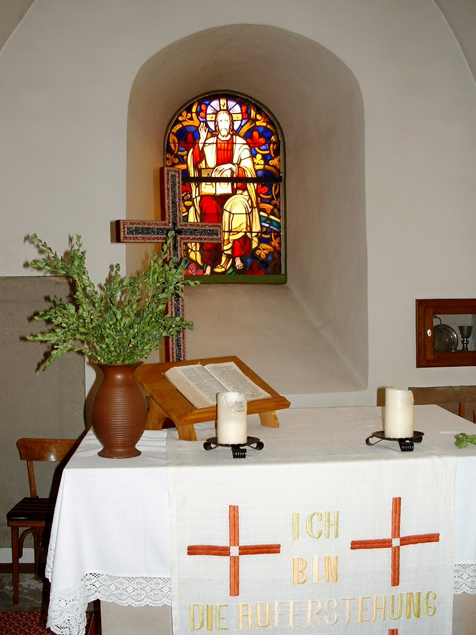 Evangelische Kirche Sensweiler, Altar